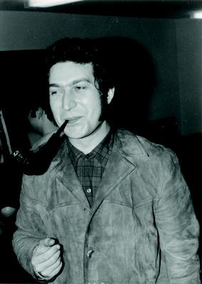 Foto di Jean-Michel Bony